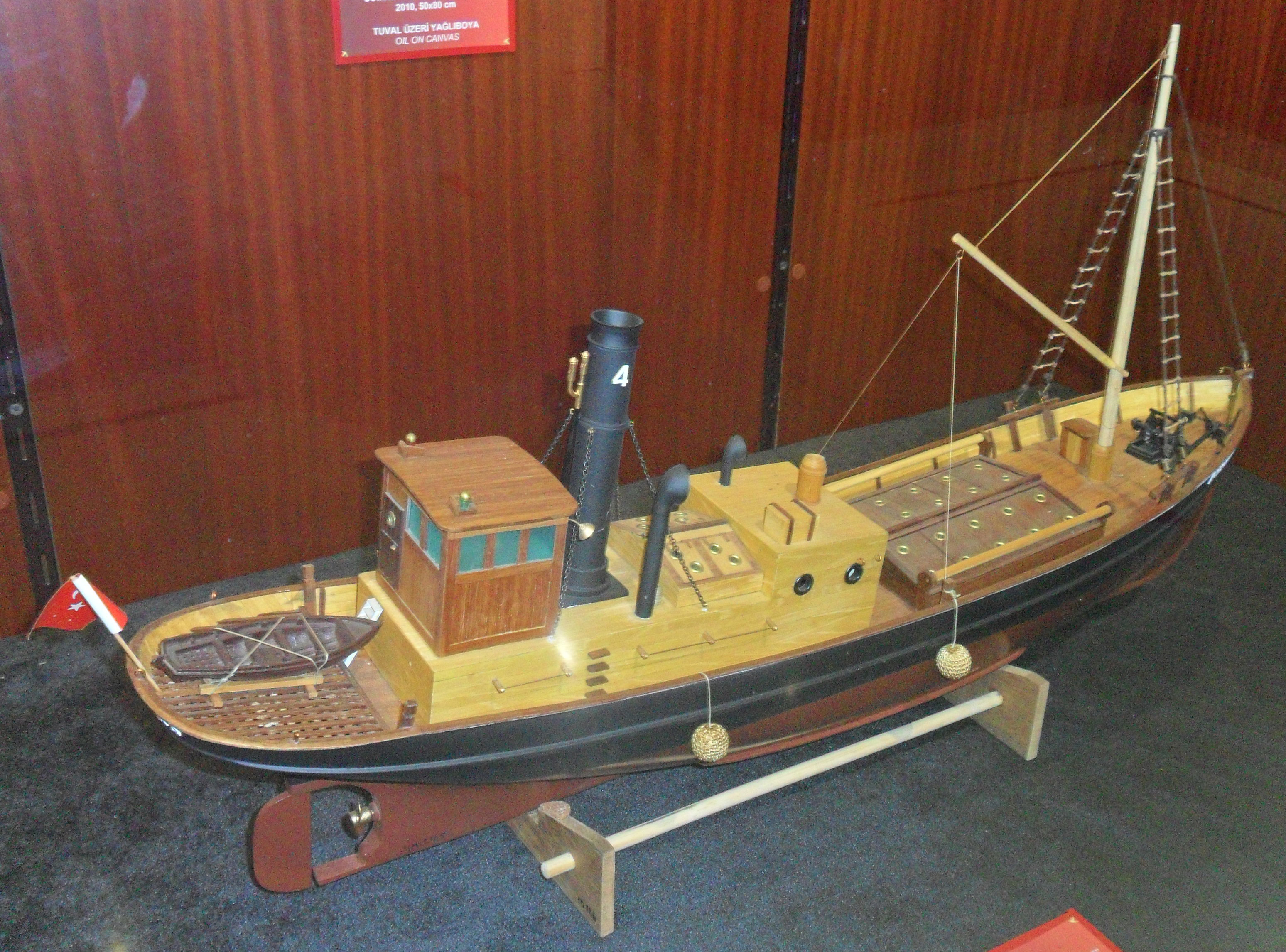 Mersin Deniz Müzesinde sergilenmekte olan Rüsumat No. 4 tam gemi modeli.